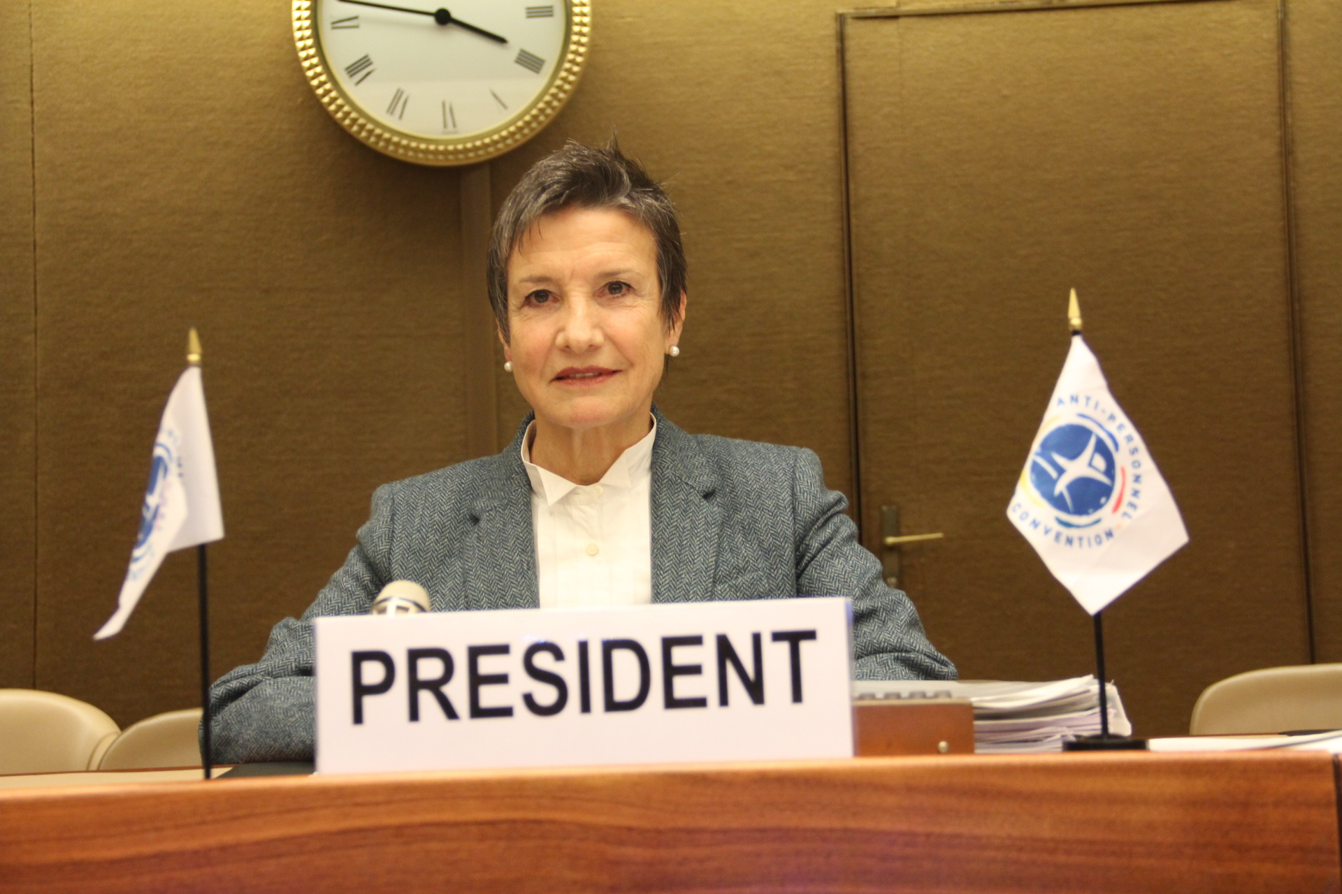 La Embajadora de Chile ante la ONU en Ginebra, Suiza, Marta Maurás después de recibir la Presidencia de la Convención de Ottawa, que prohíbe el uso de minas antipersonal.